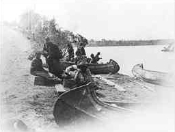 Ojibwe boatlanding